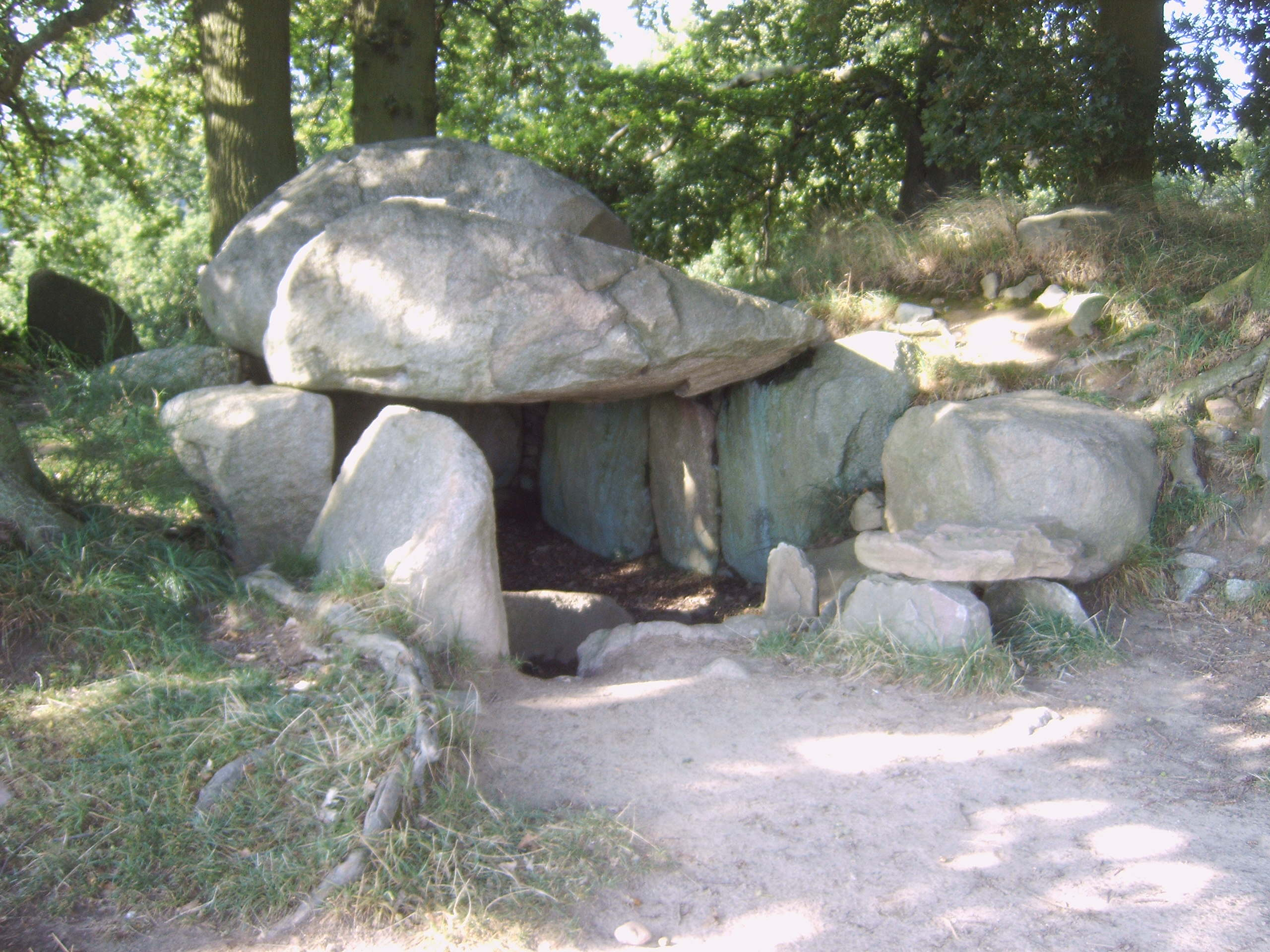 Großsteingrab Lancken 1 (nach Sprockhoff: Nr. 504[1]).Östlichstes Großsteingrab des Gräberfelds bei Lancken-Granitz, Rügen, Deutschland